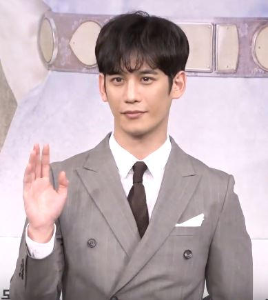 17일 오후 서울 마포구 MBC 골든마우스홀에서 MBC 새 수목 드라마 ‘신입사관 구해령’ 제작발표회가 열렸다.